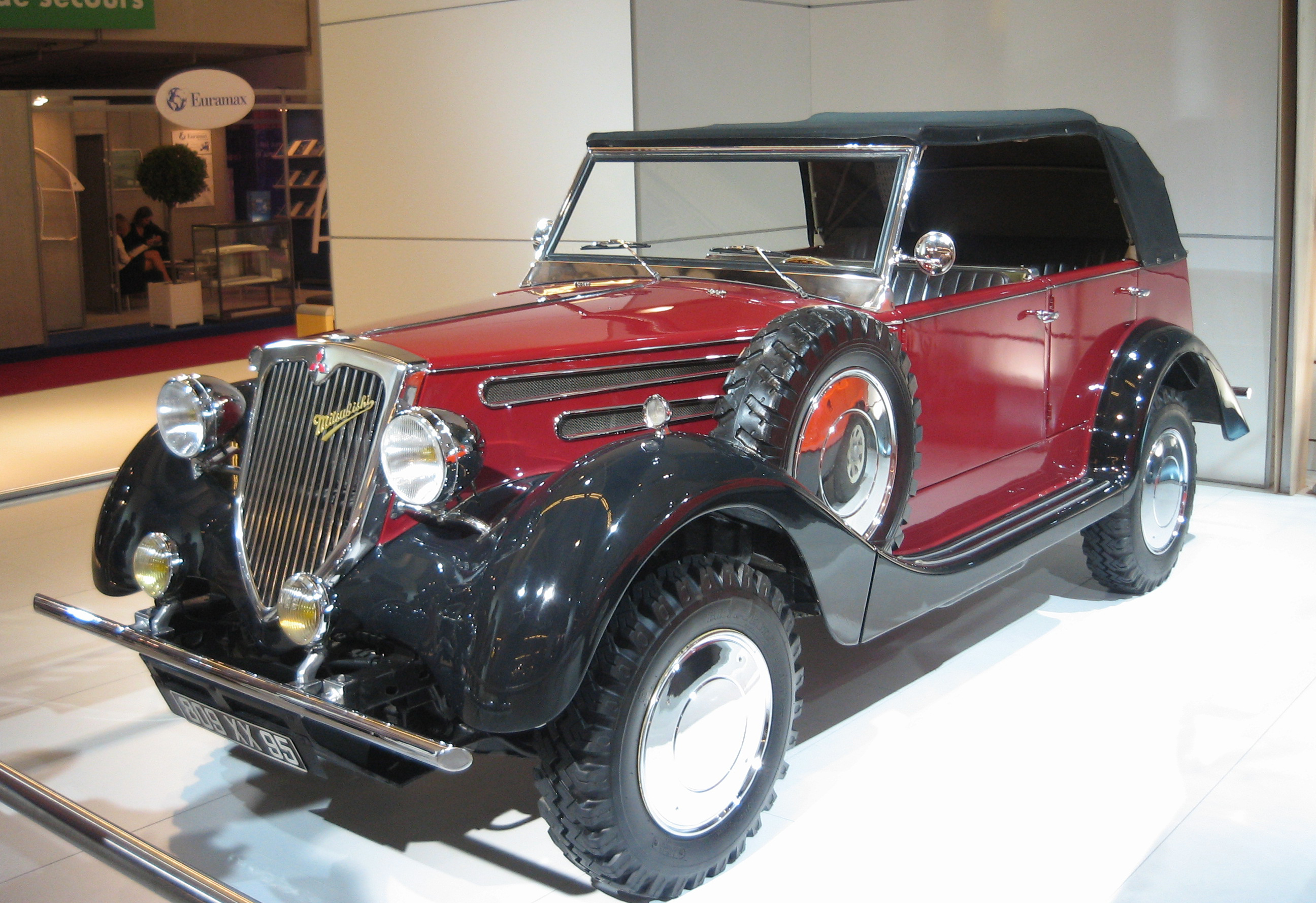 Mitsubishi PX33 (1933)